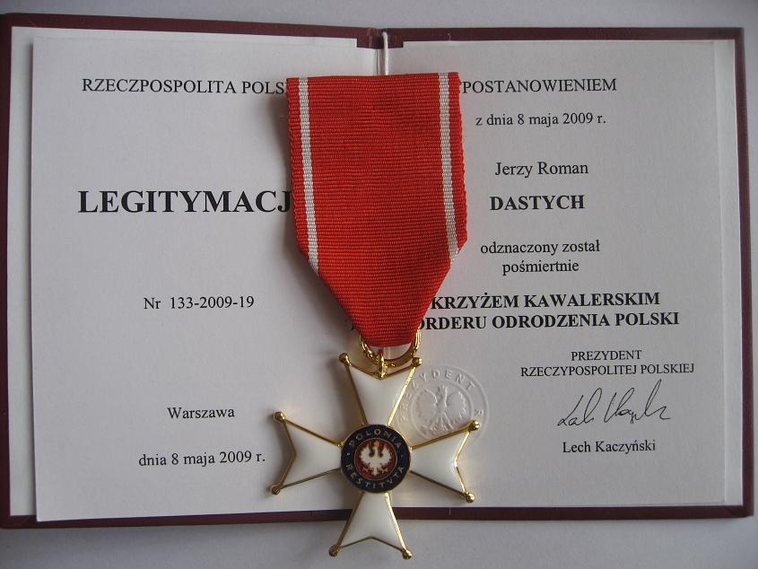 Jerzy Dastych - Krzyż Kawalerski Orderu Odrodzenia Polski